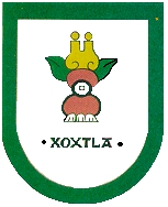 Escudo de armas del municipio Poblano de San Miguel Xoxtla